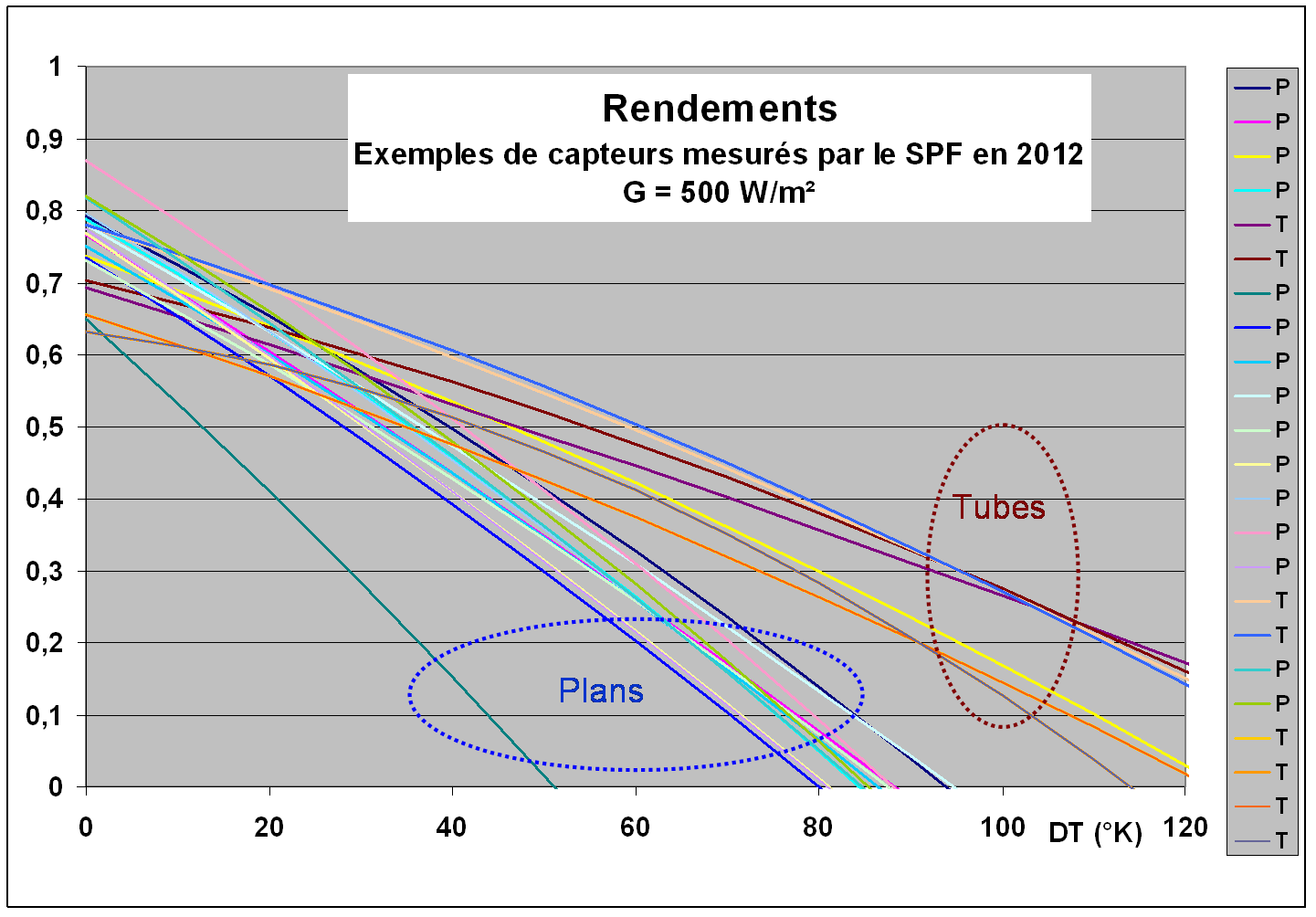 Courbes de rendement de capteurs solaires thermiques mesurés par le laboratoire SPF